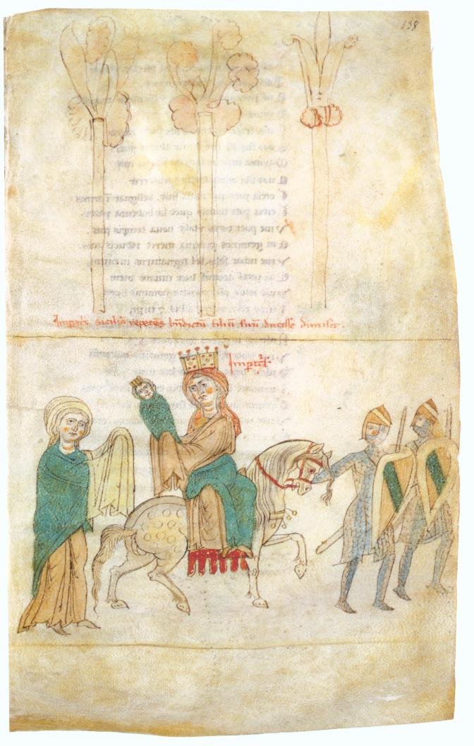 Übergabe des Thronfolgers, des späteren Friedrich II, in Jesi durch Konstanze von Sizilien an die Herzogin von Spoleto. Petrus von Eboli, Liber ad honorem Augusti, Bern, Burgerbibliothek, Codex 120. II, fol. 138r.